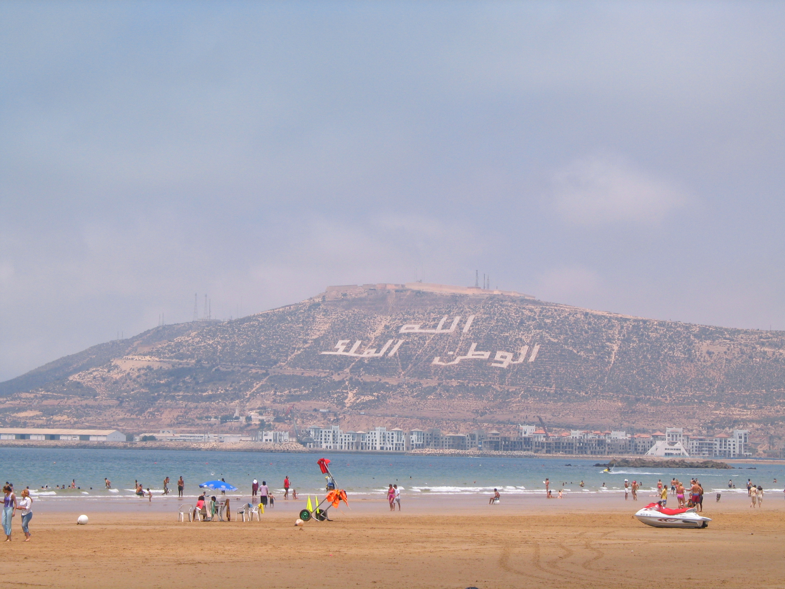 Agadir (Maroc), la Kasbah